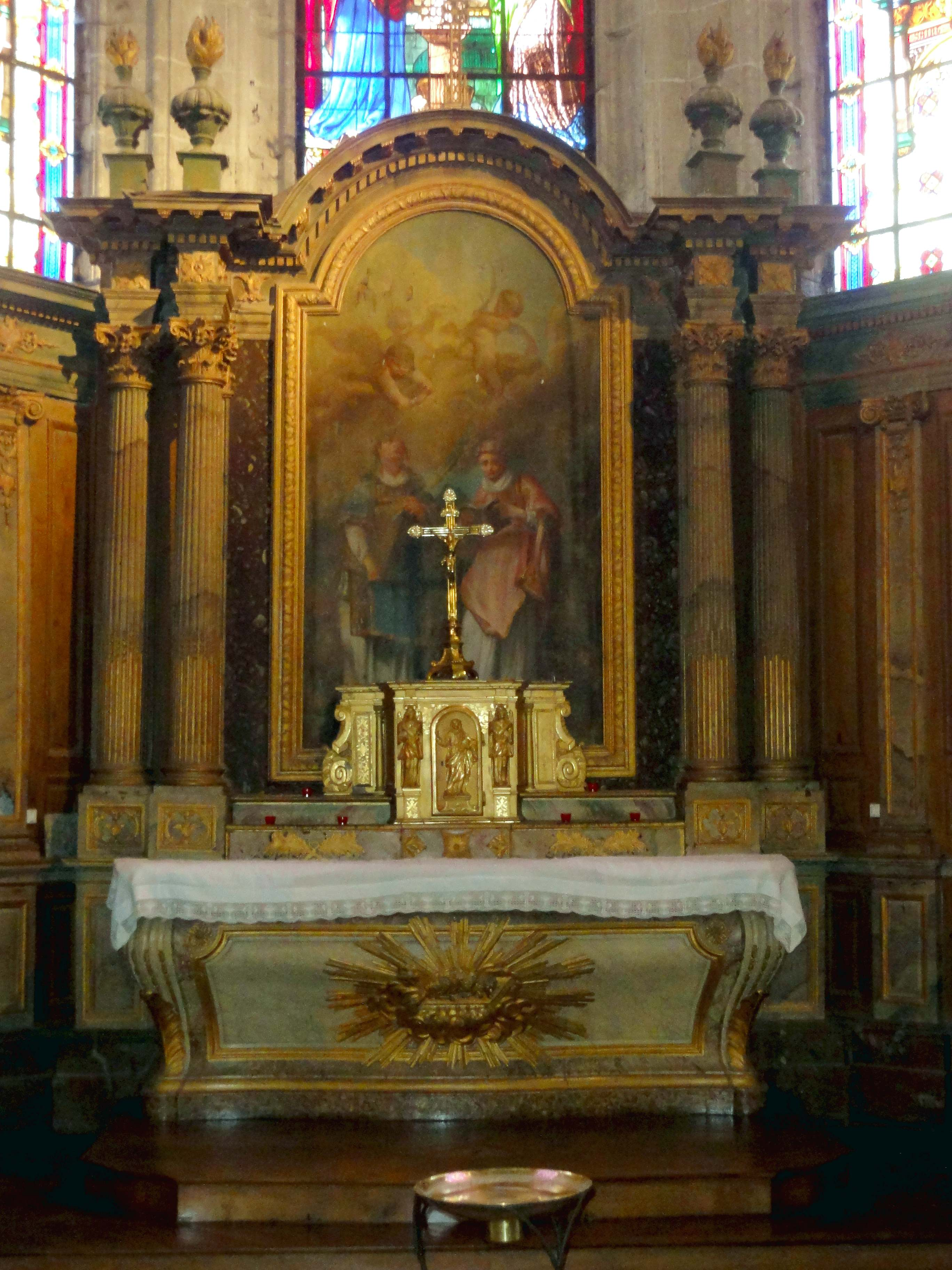 Mobilier de l'église (voir titre).